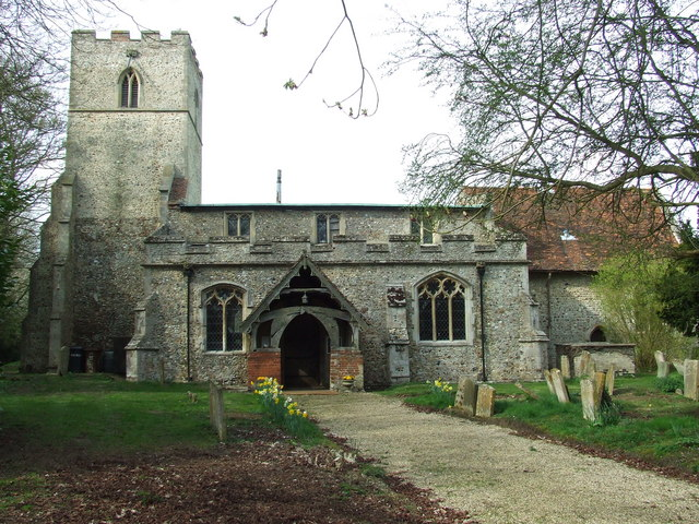 St Margaret Stradishall